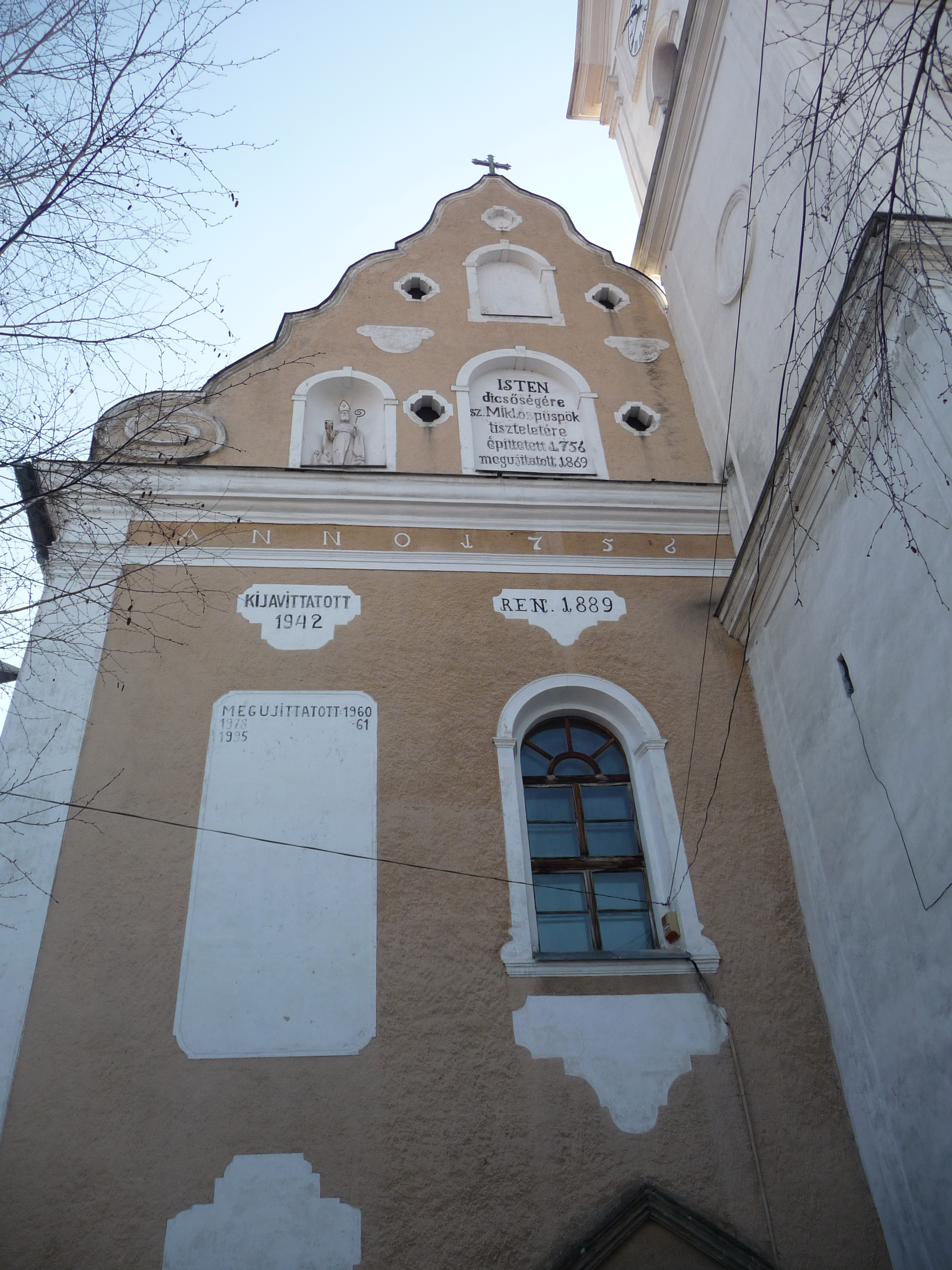 Gyergyószentmiklós, a római katolikus templom homlokzata 01